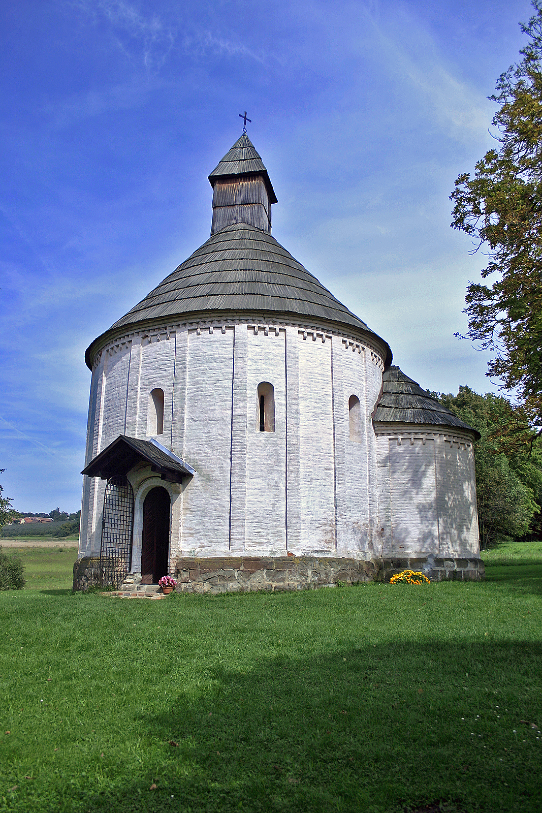 Rotunda, Selo. Rotunda, Selo. Rotunde, Selo.